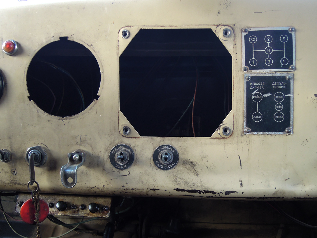 Средняя часть приборной панели седельного тягача КрАЗ-258